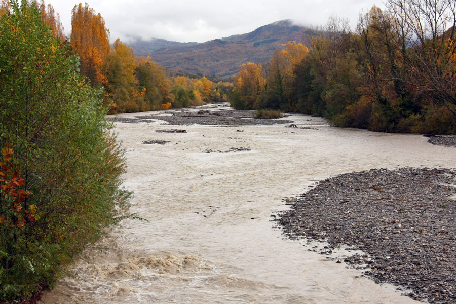 Il torrente Staffora a Varzi durante le alluvioni del novembre 2011.